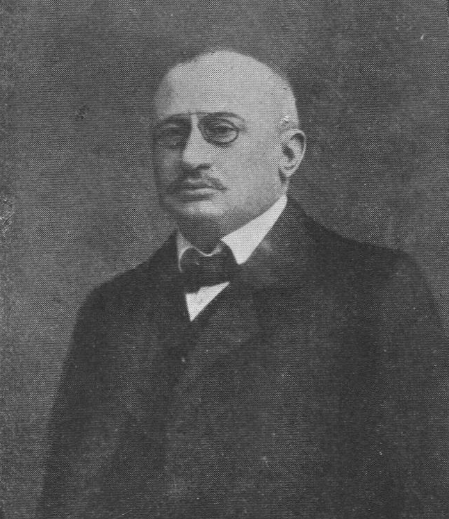 Axel Fredrik Londen (1859–1928)